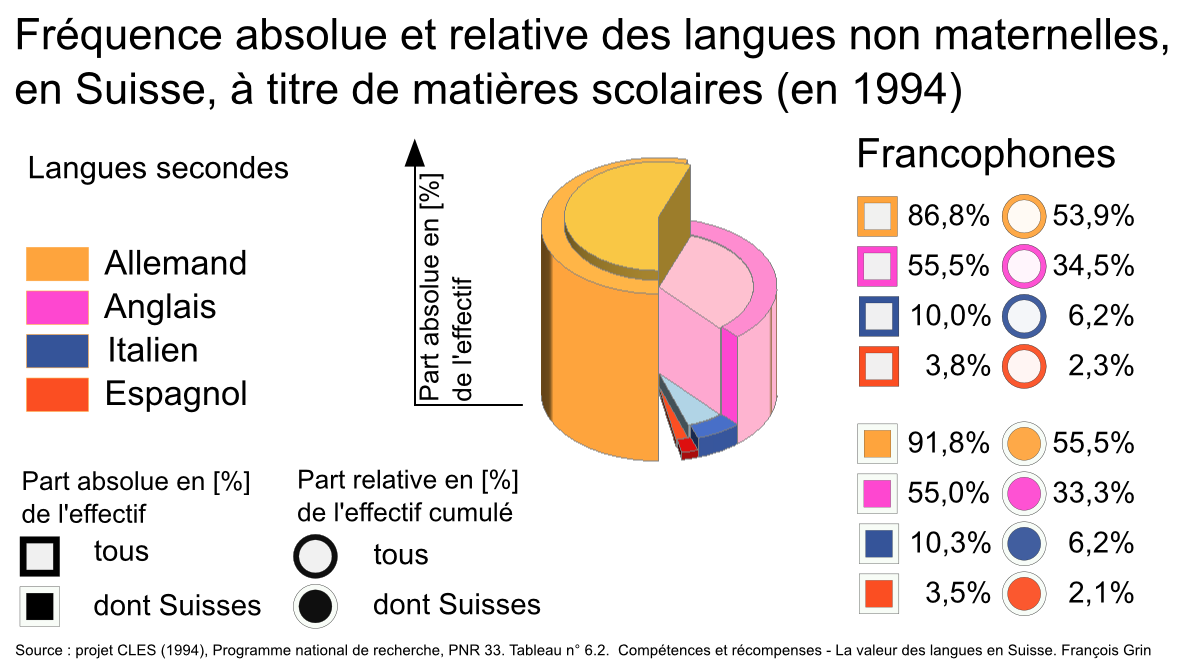 Fréquence absolue et relative des langues non maternelles, en Suisse, à titre de matières scolaires (en 1994). Pour les francophones. Graphique réalisé sur la base du tableau n° 6.2, p. 110 du livre Compétences et récompenses - La valeur des langues en Suisse de François Grin, Éditions universitaires Fribourg, Suisse, 1999 (ISBN 2-8271-0843-7)